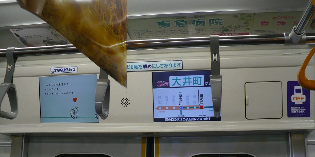 東急6000系の車内